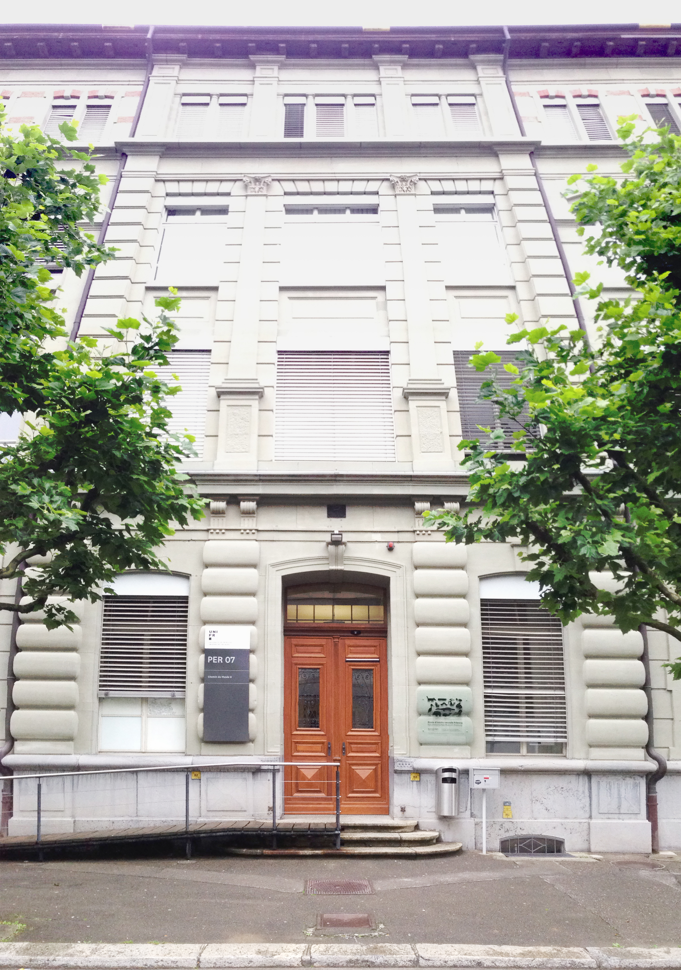 Façade et entrée principale du musée d'histoire naturelle de Fribourg, en Suisse.